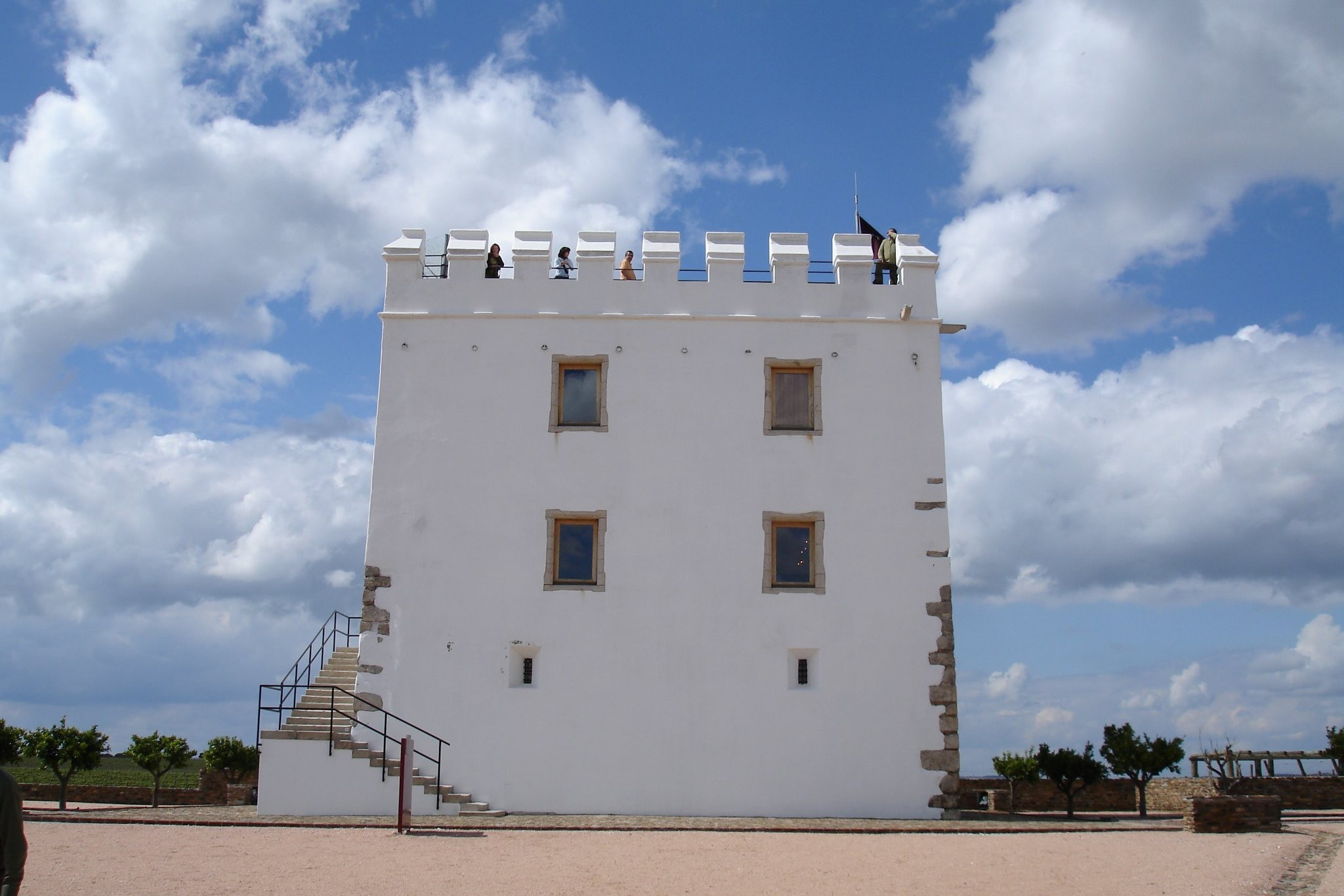 O Castelo de Esporão, também referido como Torre do Esporão é uma estrutura arquitetónica de fortificação localizada na freguesia, povoação e concelho de Reguengos de Monsaraz, no distrito de Évora, em Portugal. This file was uploaded for Wiki Loves Monuments in Portugal with the unique identifier 73376.